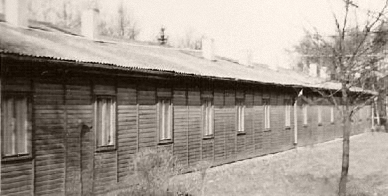 Unterkunft Mannschaft Camp Astrid im Propsteier Wald 1969